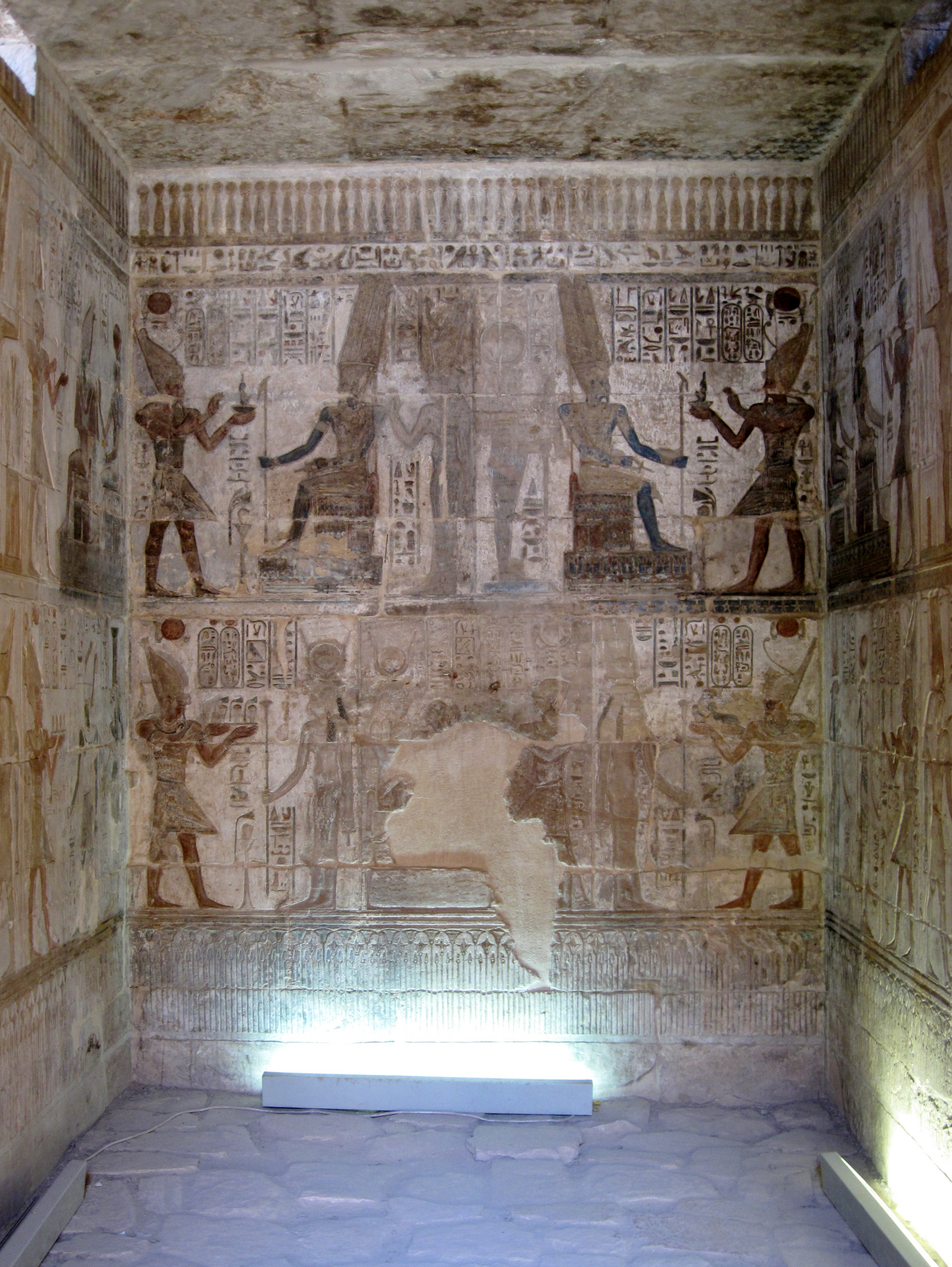 Mittlere Kapelle für Hathor im Hathor-Tempel von Deir el-Medina („Kloster der Stadt“), altägyptisch Set Maat („Platz der Wahrheit“), in Theben-West bei Luxor, Ägypten